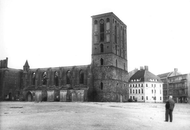 Zentralbild Berlin im August 1955. UBz die Ruine der Nikolaikirche. (Das erste Gebäude wurde um 1230 errichtet und war die älteste Kirche Berlins).